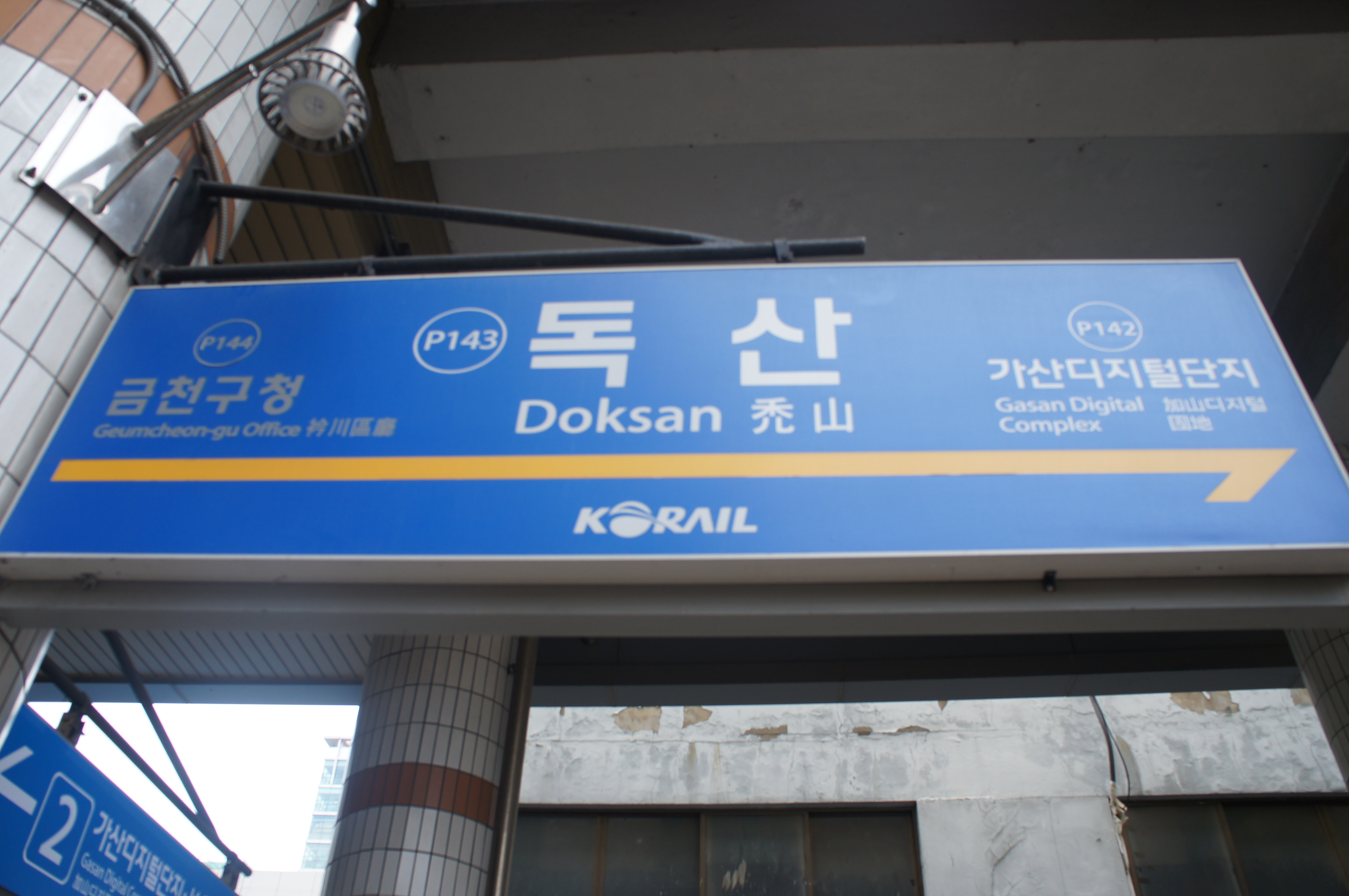 독산역 역명판